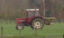 International Harvester-traktor med Vicon kunstgødningsspreder